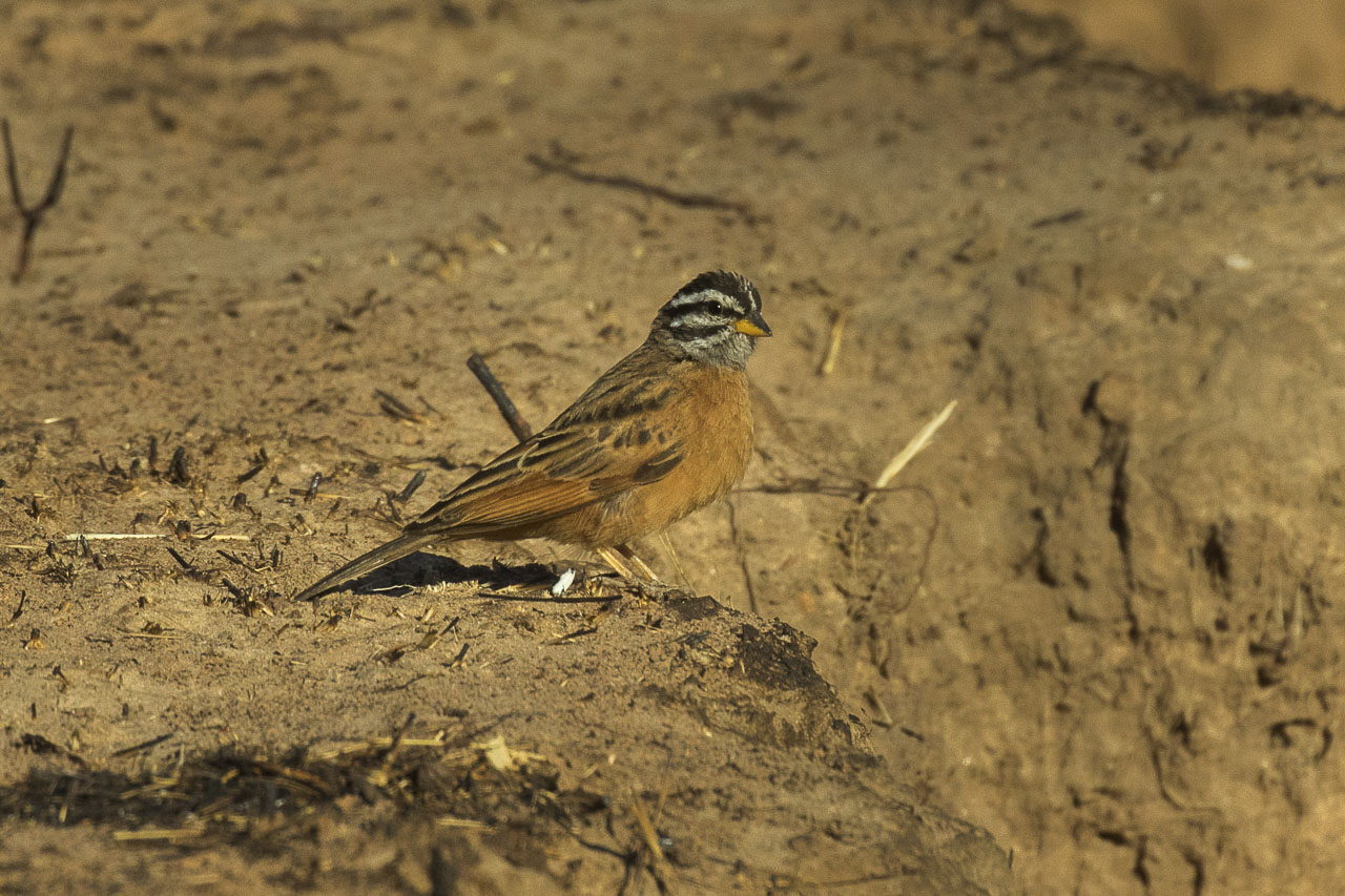 Gosling's Bunting - Gambia 17_CD5A0894